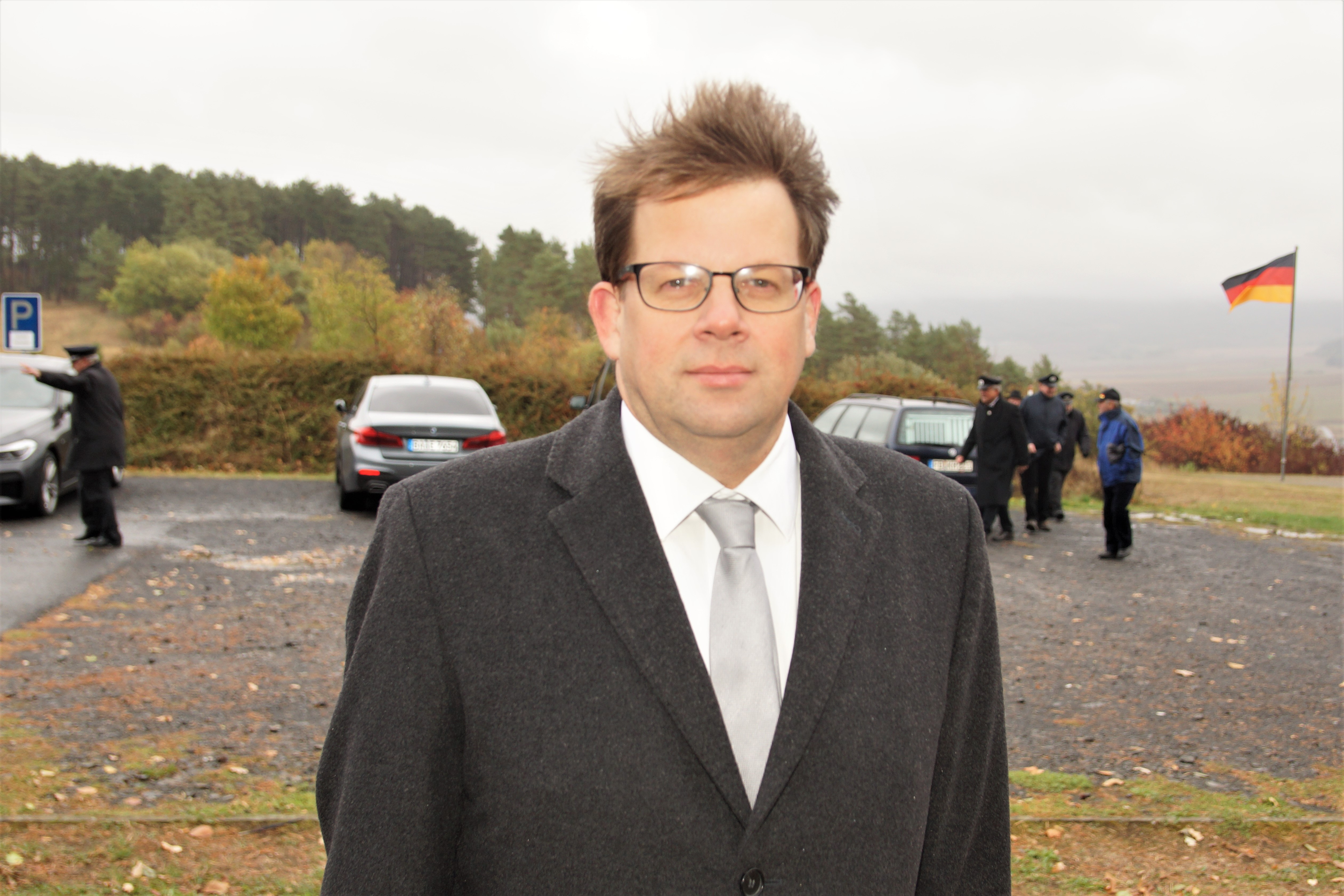 Heiko Wingenfeld